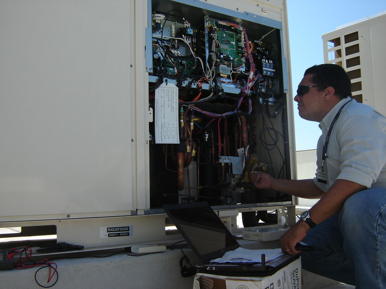 Engenheiro de campo executando comissionamento de obra de equipamento de ar condicionado tipo VRF